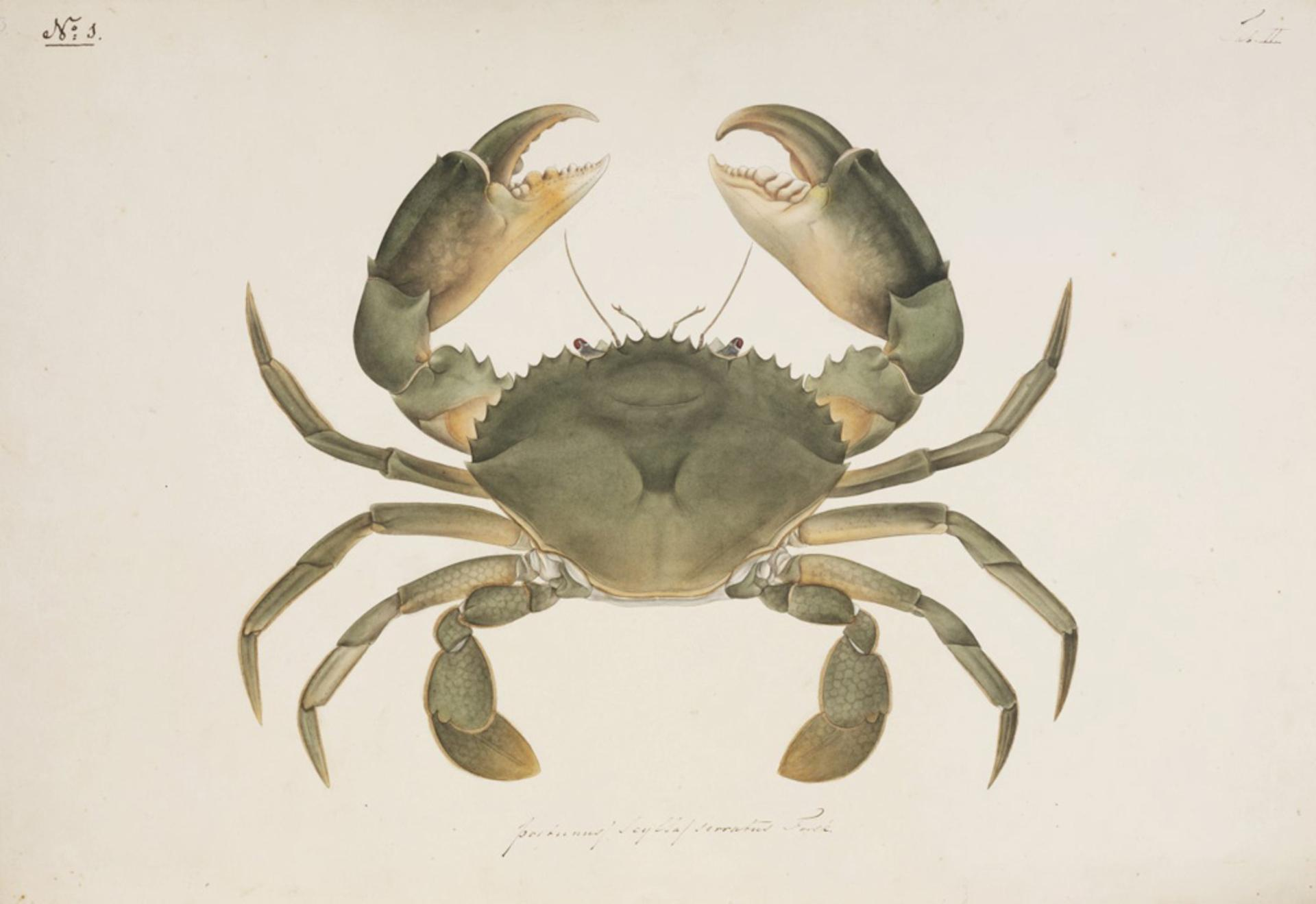 Scylla serrata (Forsskål)